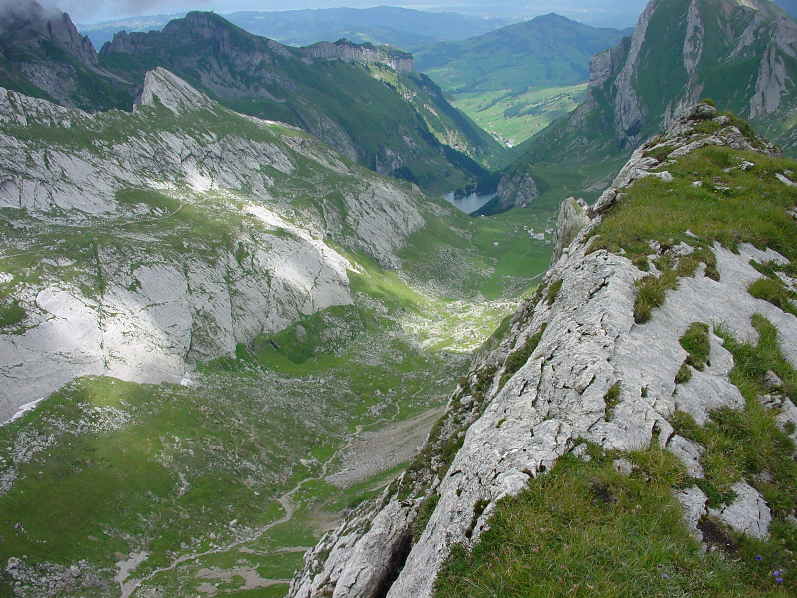 Alpstein, Meglisalp von oben